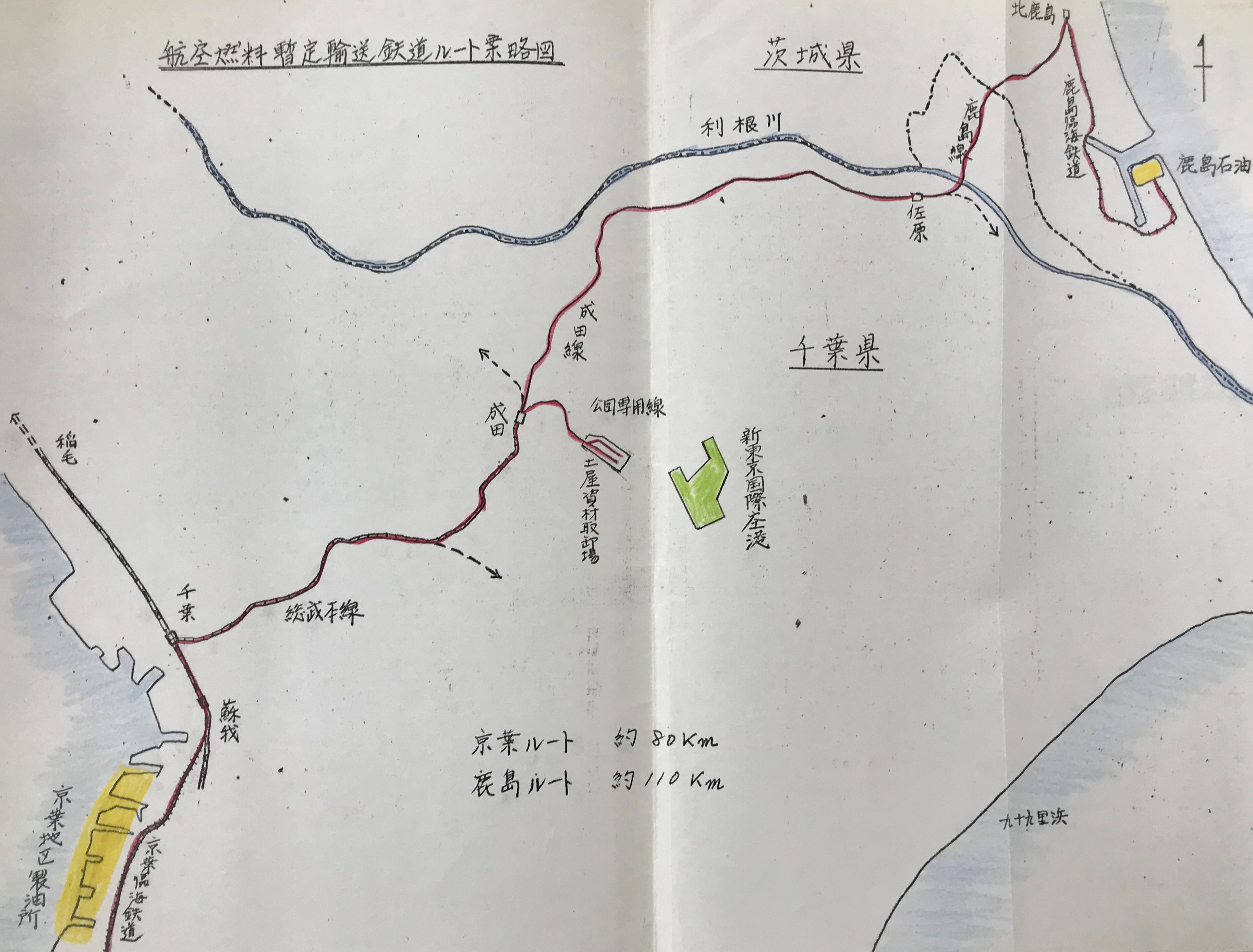 『臨時新東京国際空港閣僚協議会幹事会の開催について』（1973年01月31日）中資料。 国立公文書館にて撮影。